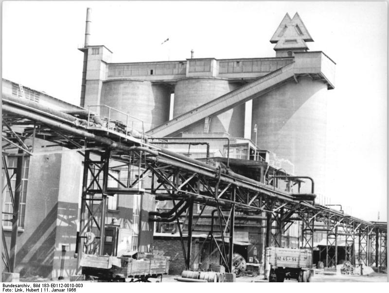 Magdeburg, VEB Fahlberg-List, Werksgelände Zentralbild Link 11.1.1966 "Fahlberg-List" - ein bedeutender Betrieb der Chemieindustrie der DDR Der Name des volkseigenen Betriebs "Fahlberg-List" aus Magdeburg und sein Firmenzeichen, die drei ineinander verschlungenen Dreiecke, sind außer in der DDR in 36 Staaten der Erde bekannt. Zur Produktion des Betriebes gehören vor allen Pflanzenschutz- und Schädlingsbekämpfungsmittel, pharmazeutische, chemische sowie chemisch-technische Erzeugnisse. UBz: Vor den drei 45m hohen Silos wird das Rohphosphat der Weiterverarbeitung zugeführt. Die Silos hanen ein Fassungsvermögen von je 5000 t.